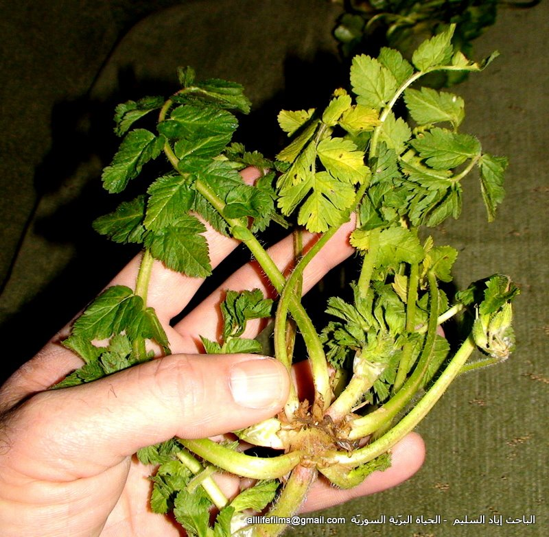 نباتات برّية سورية تؤكل